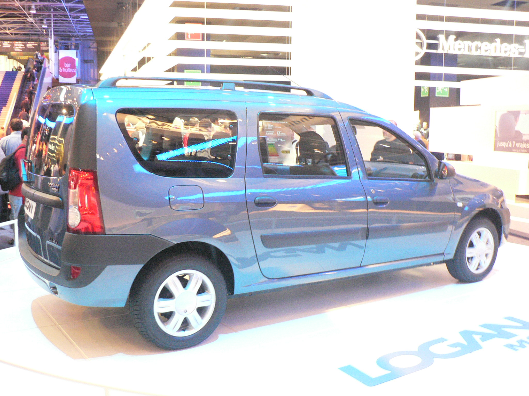 Mondial de l'automobile, Paris 2006